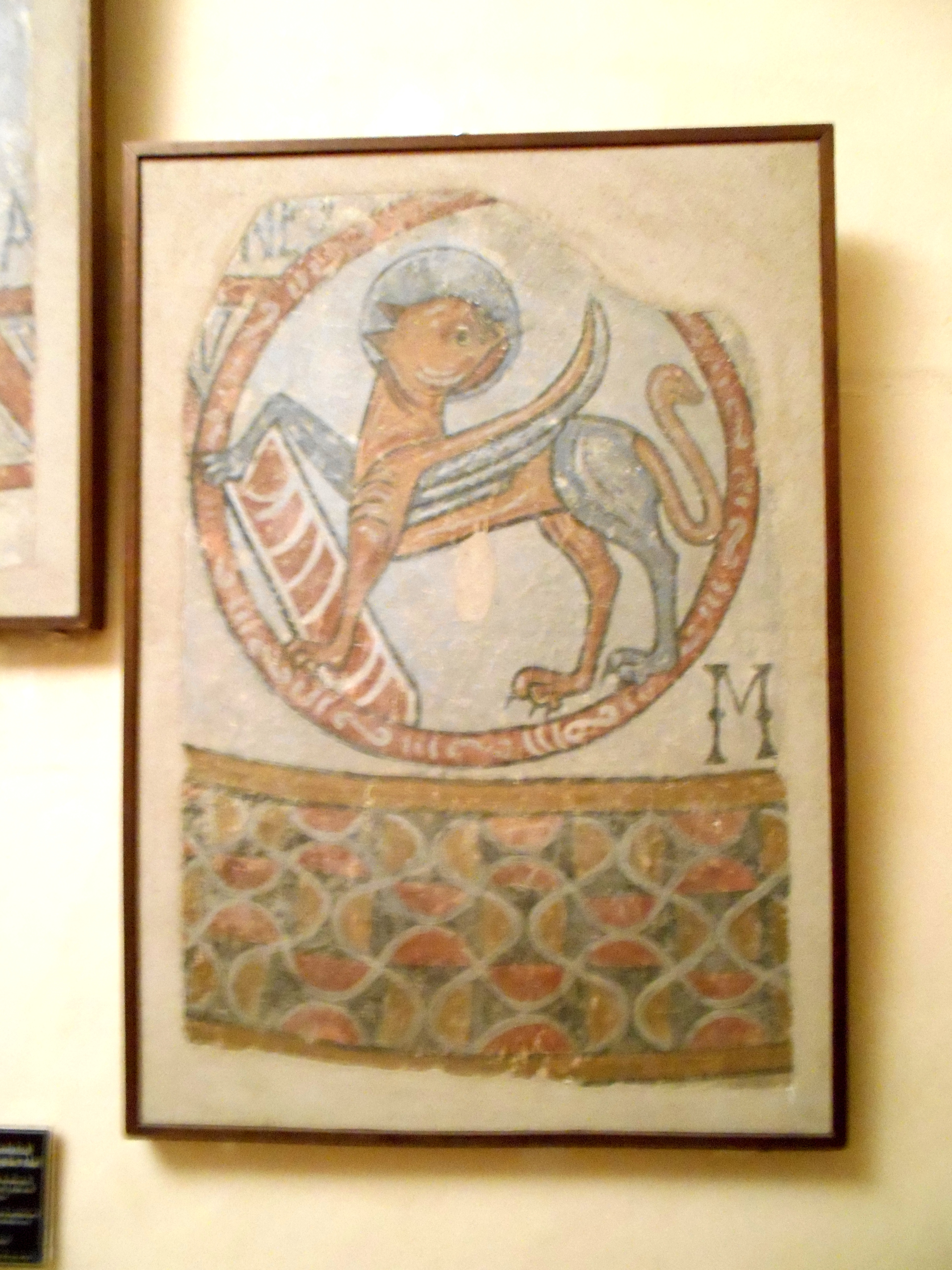 Pintures romàniques de Sant Salvador de Casesnoves, a Illa.